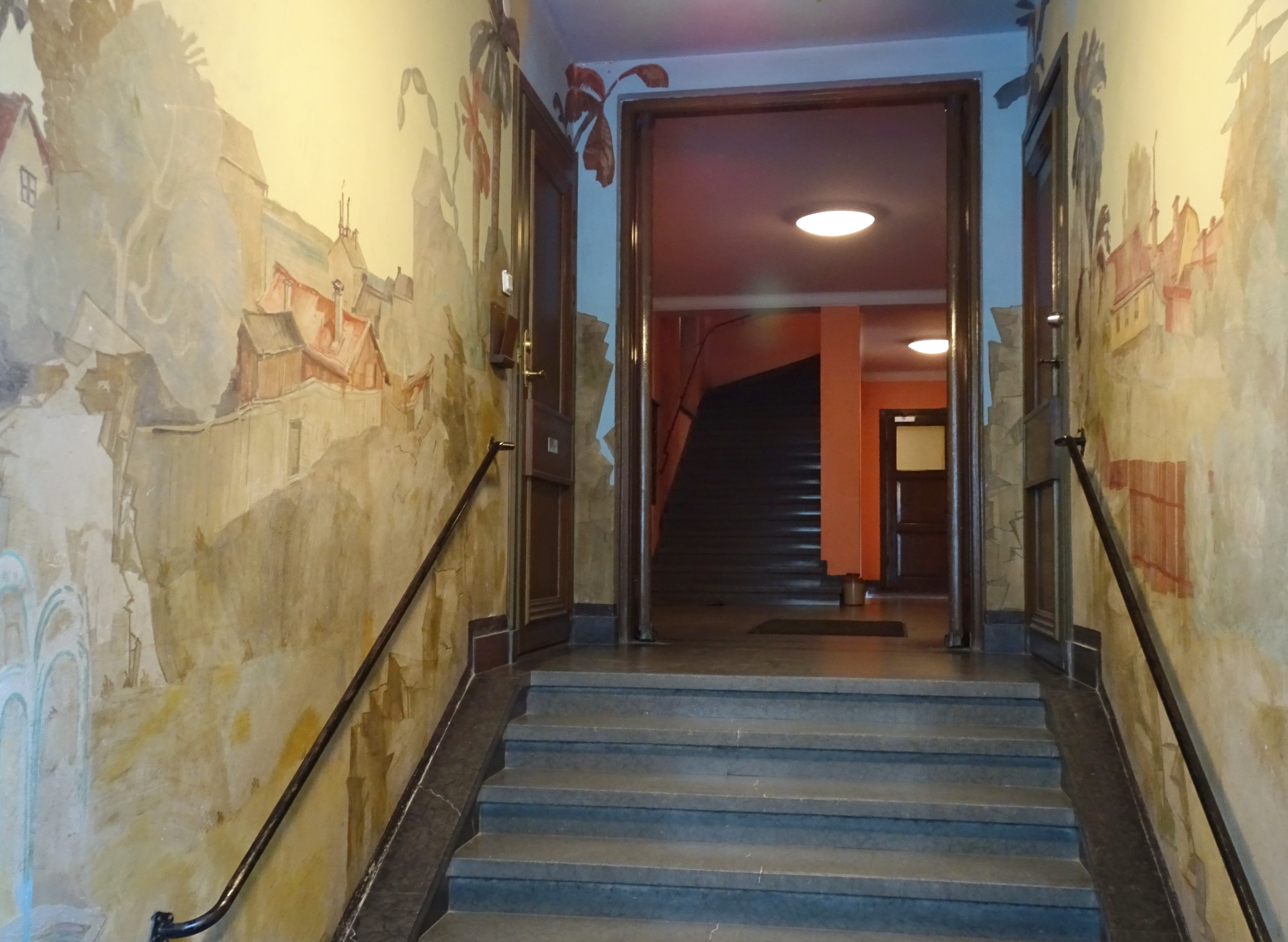 Kronan 3 - Entré, Stigbergsgatan 37, Lilla Erstagatan 4, Uppfört 1928, arkitekt Paul Hedqvist, byggherre och byggmästare E Blom.